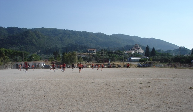 Drepano Groud Achaea Greece Γήπεδο Δρεπάνου Αχαΐας